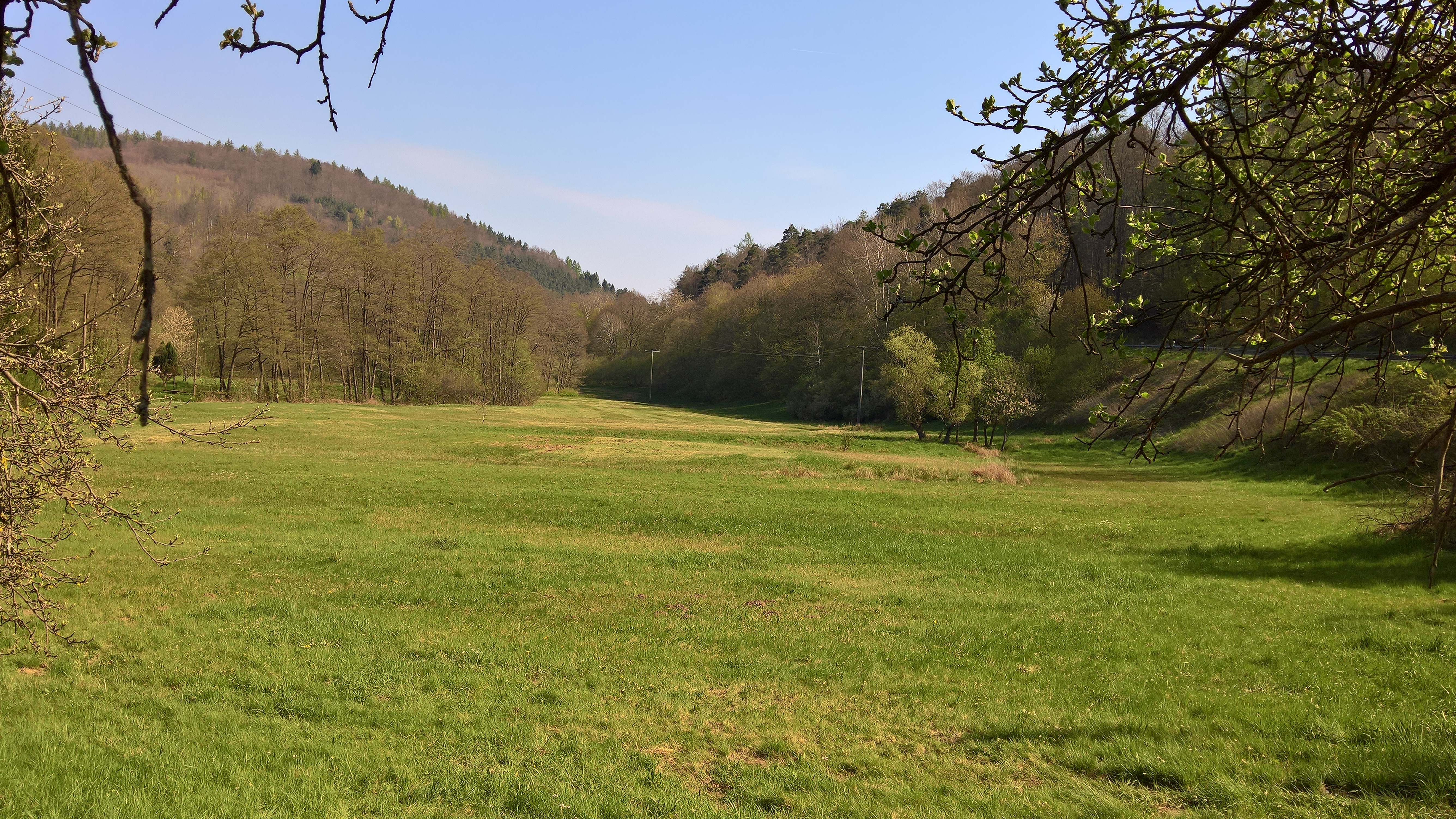 Blick von der Infotafel nach Osten zum Burgstall